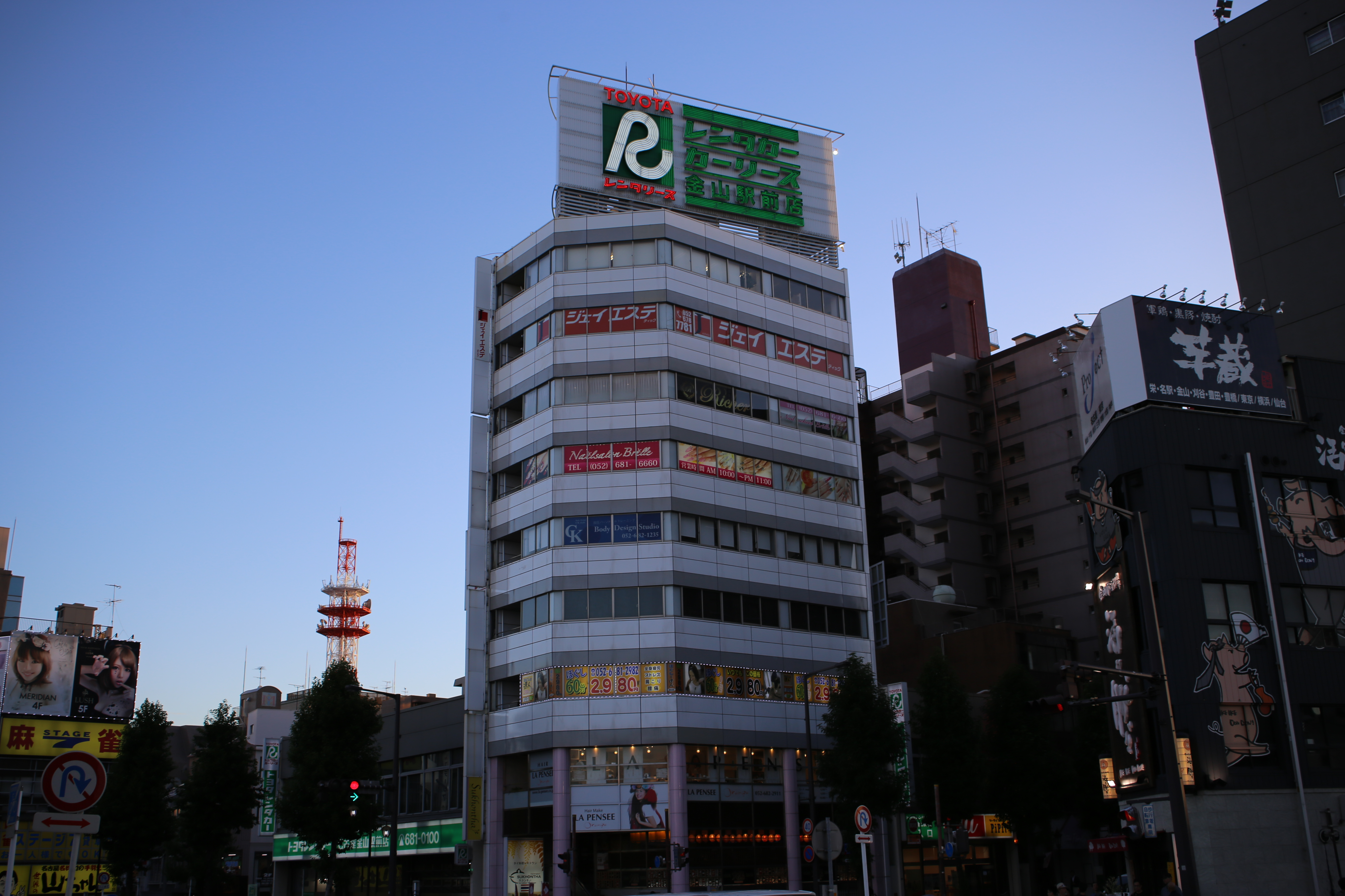 名古屋市熱田区金山町一丁目のトヨタレンタリース名古屋本社を東側公道北側より撮影